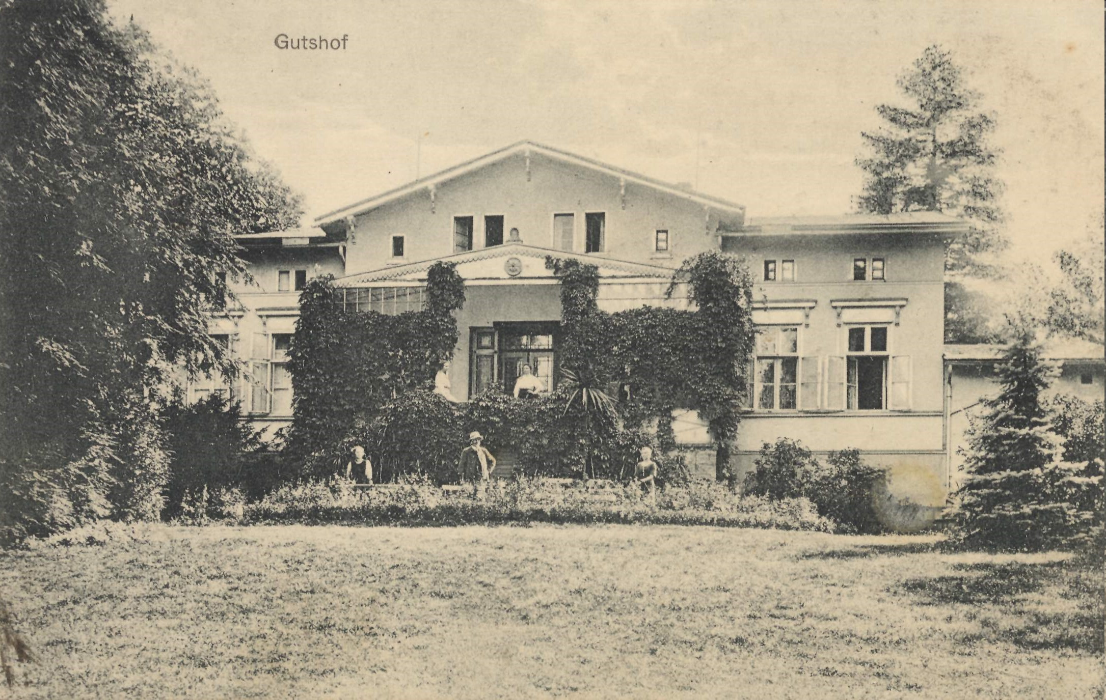 Gutshaus Summt-Mühlenbeck um 1900